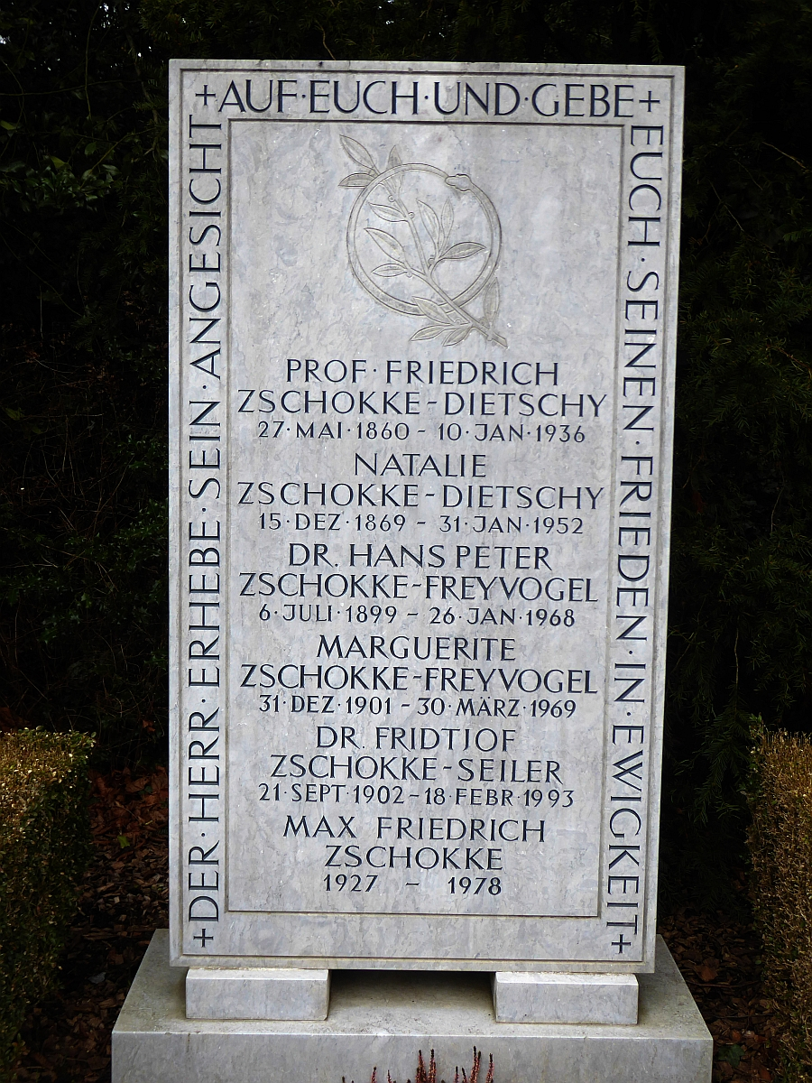 Friedrich Zschokke-Dietschy (1860–1936) Professor für Zoologie und vergleichende Anatomie an der Univ. Basel, 1900 Rektor, 1910 Dr. med. h.c. der Univ. Basel, 1920 Dr. scient. h.c. der ETH Zürich. Familiengrab auf dem Friedhof Hörnli, Riehen, Basel-Stadt